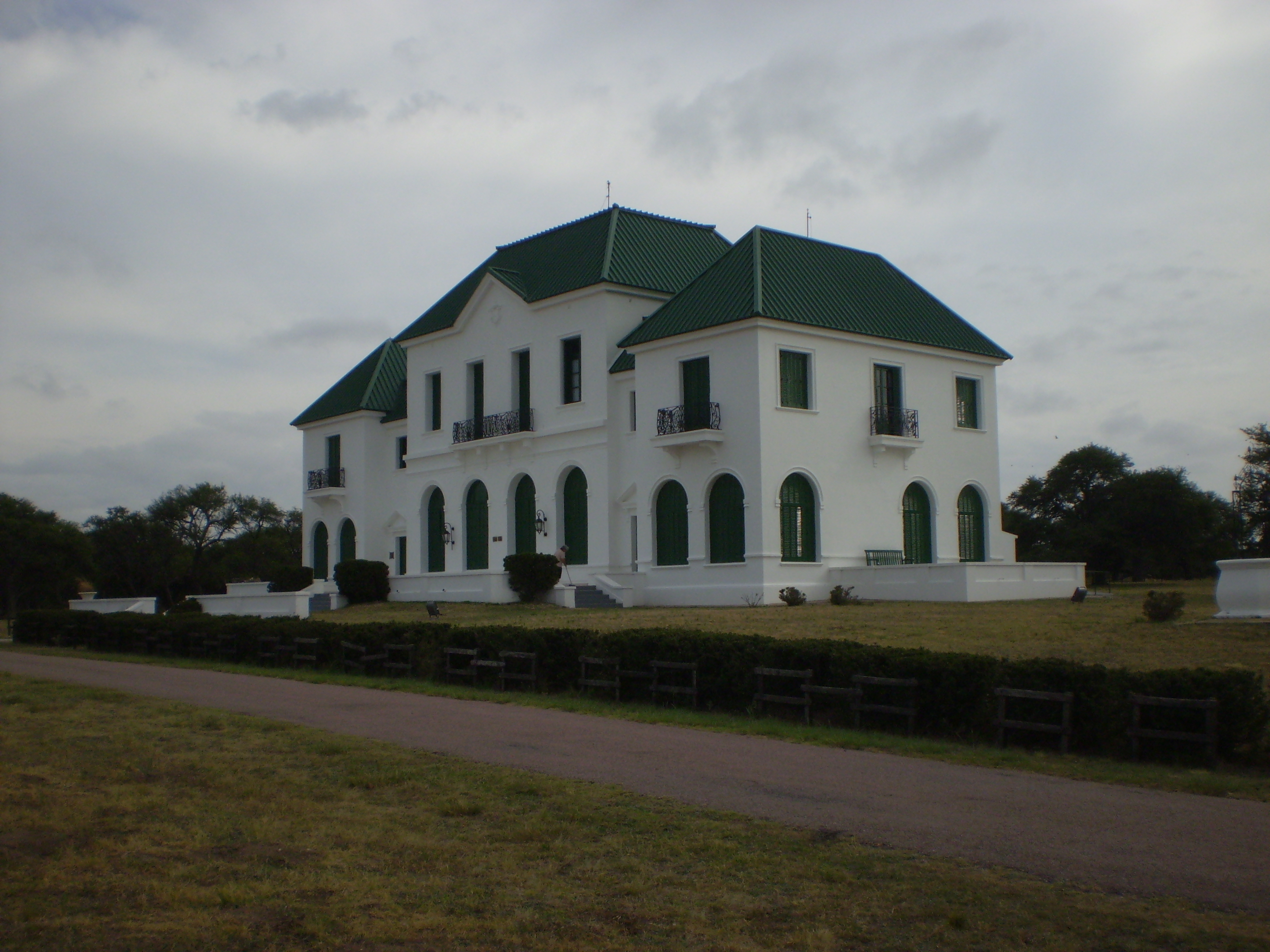 (Castillo) Reserva natural "Parque Luro", La Pampa, Argentina